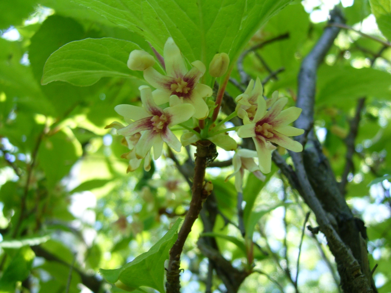 Цветки лимонника китайского